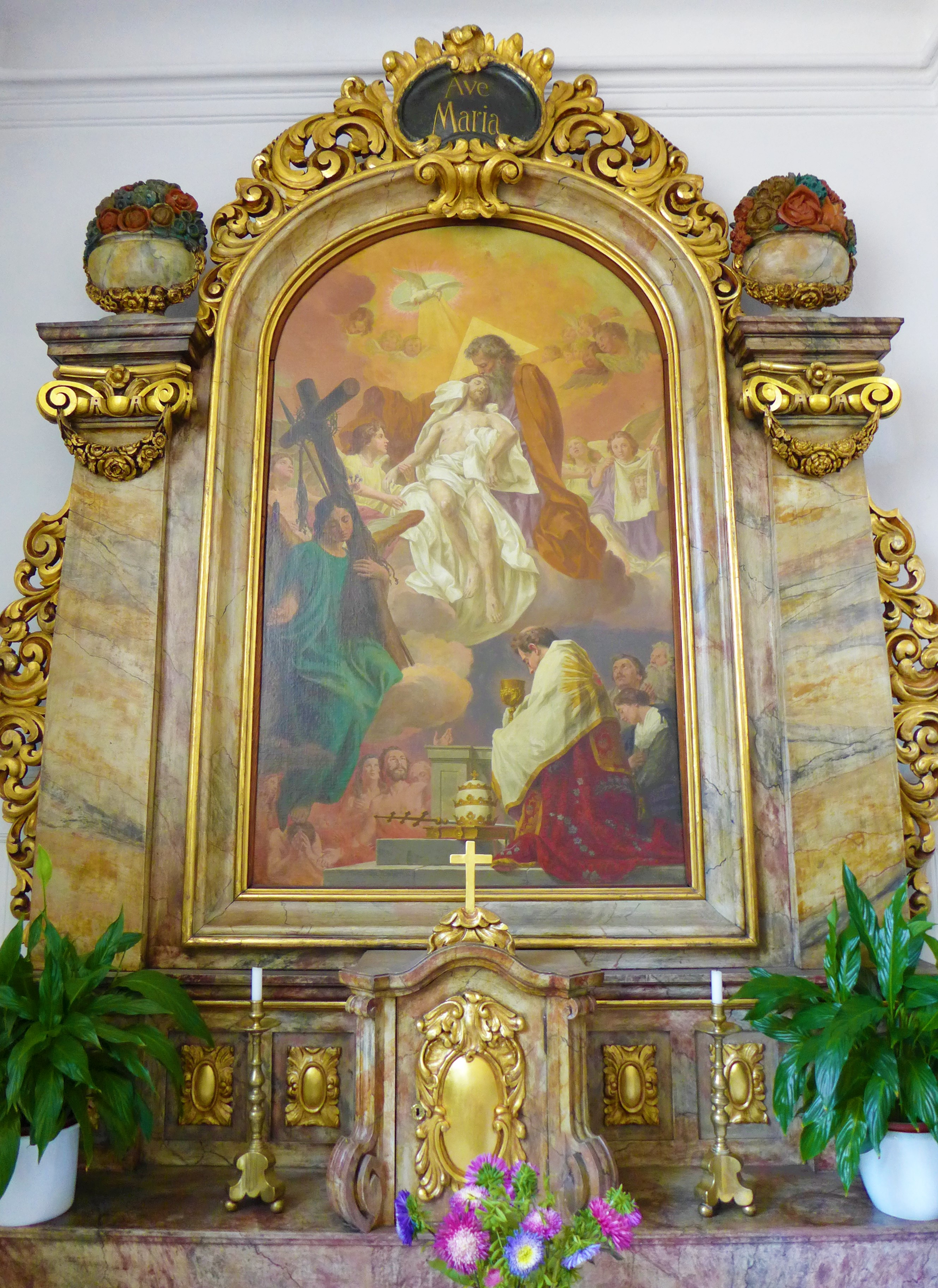 Basilika St. Johann (Saarbrücken), Armseelenkapelle